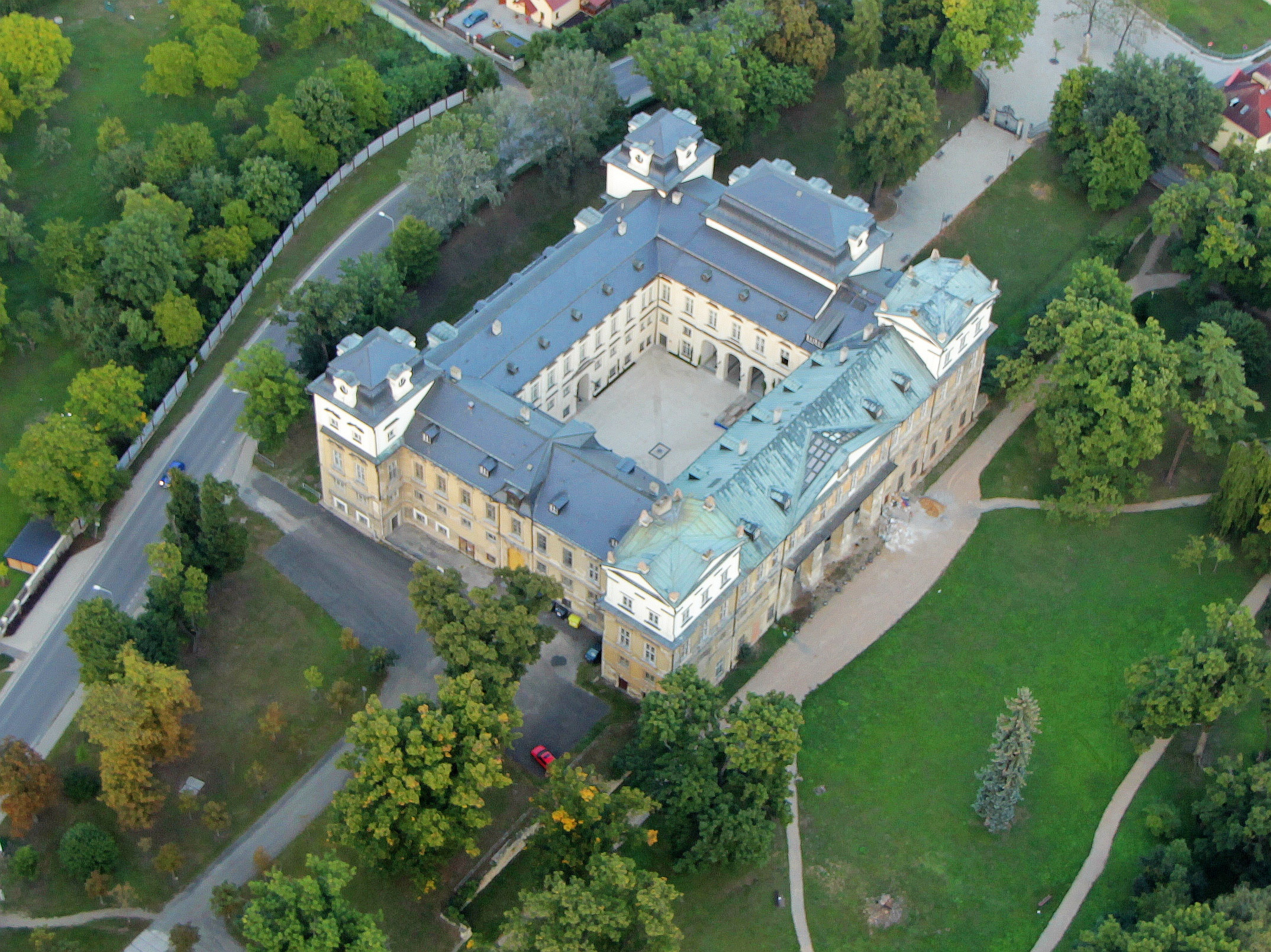 Zámek Kosmonosy, Podzámecká 1, Kosmonosy